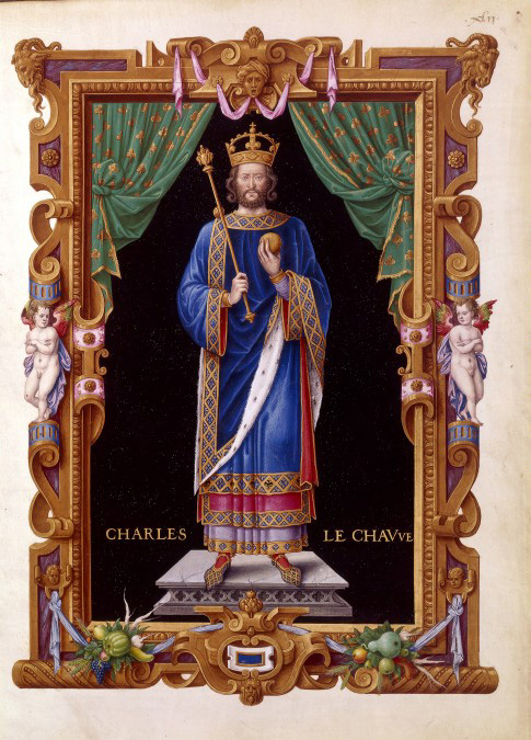 Jean Du Tillet - Charles II le chauve. Recueil des rois de France - Bibliothèque nationale de France. Peinture réalisée suivant la statue de la basilique Saint-Denis.